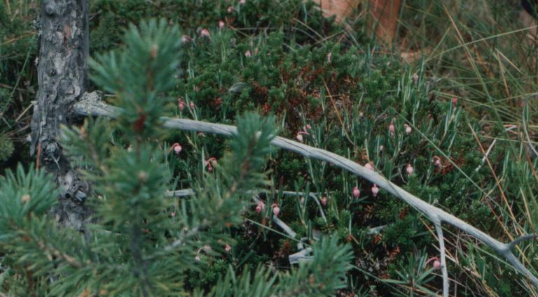 A Szent Anna-tó melletti Mohos-tőzegláp egy pici részlete